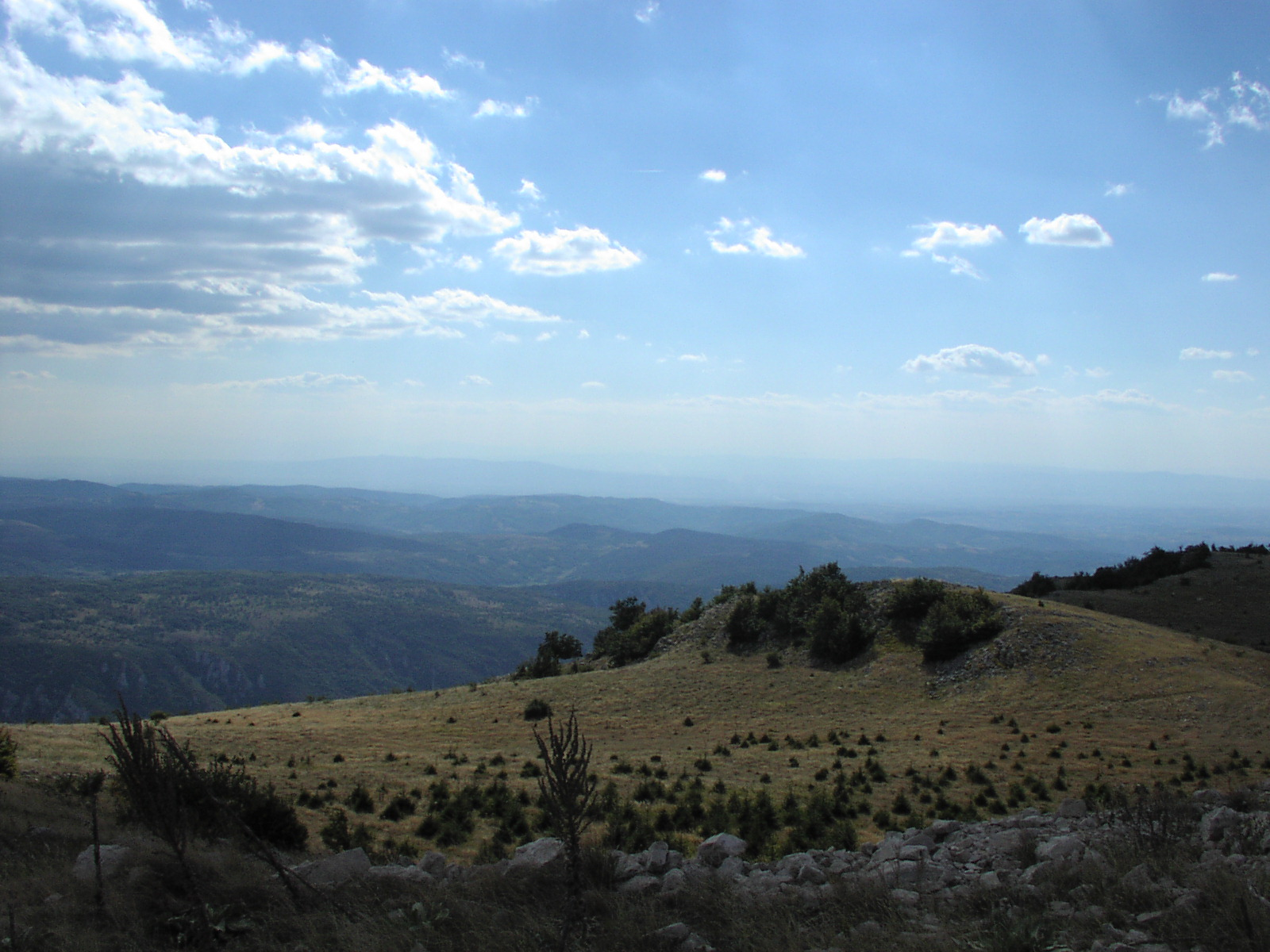 Planina Beljanica